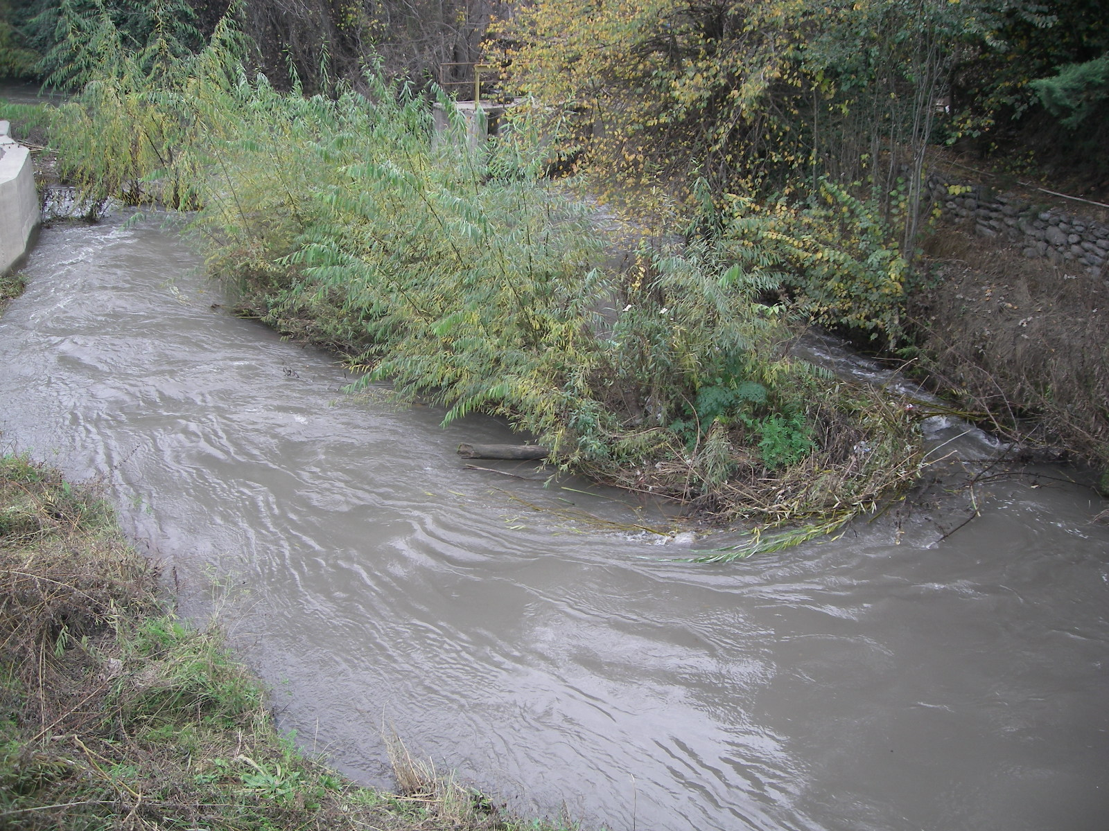 Estero La Cadena.